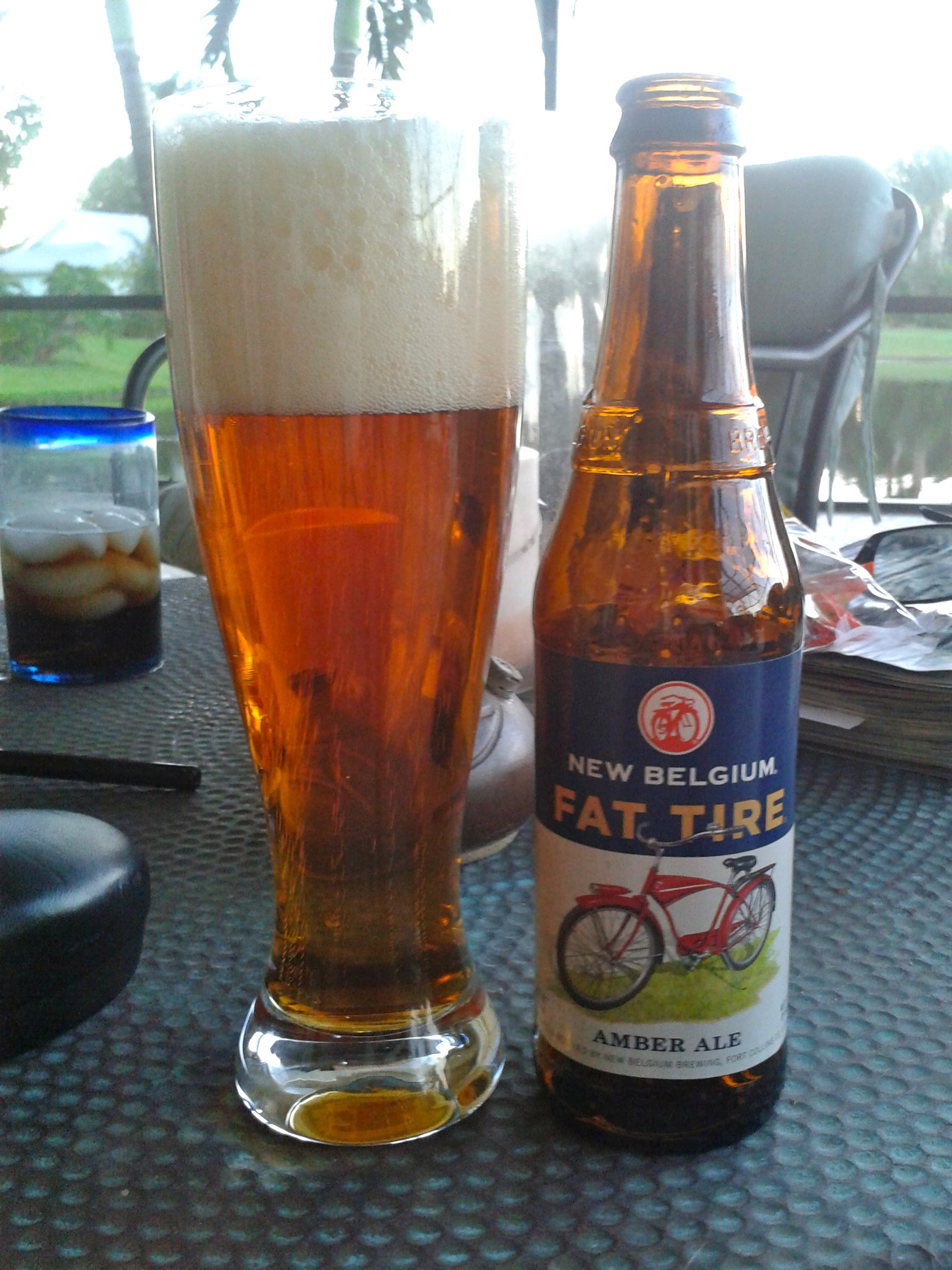 New Belgium Fat Tire Amber Ale